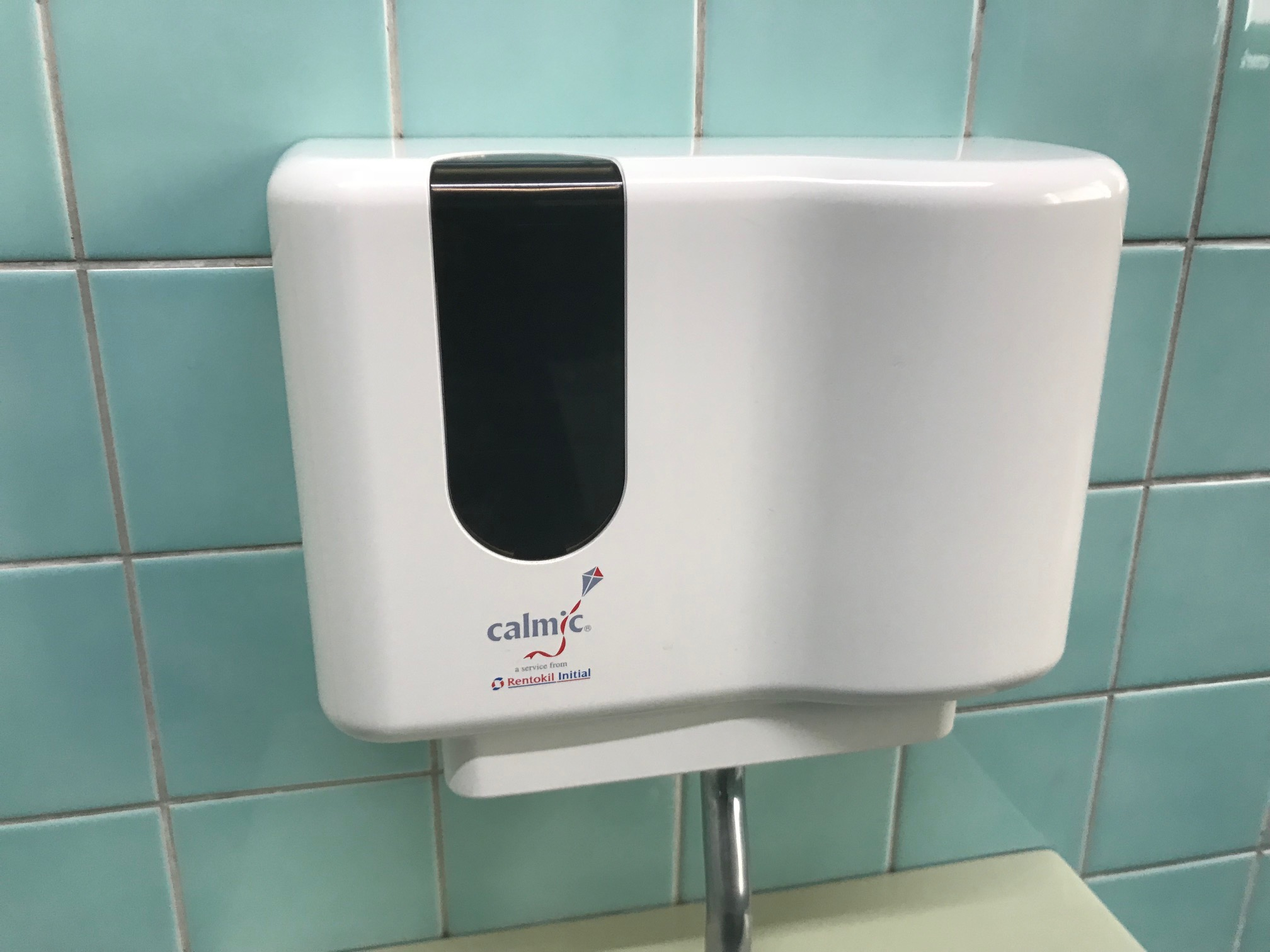 オートサニタイザーMK33